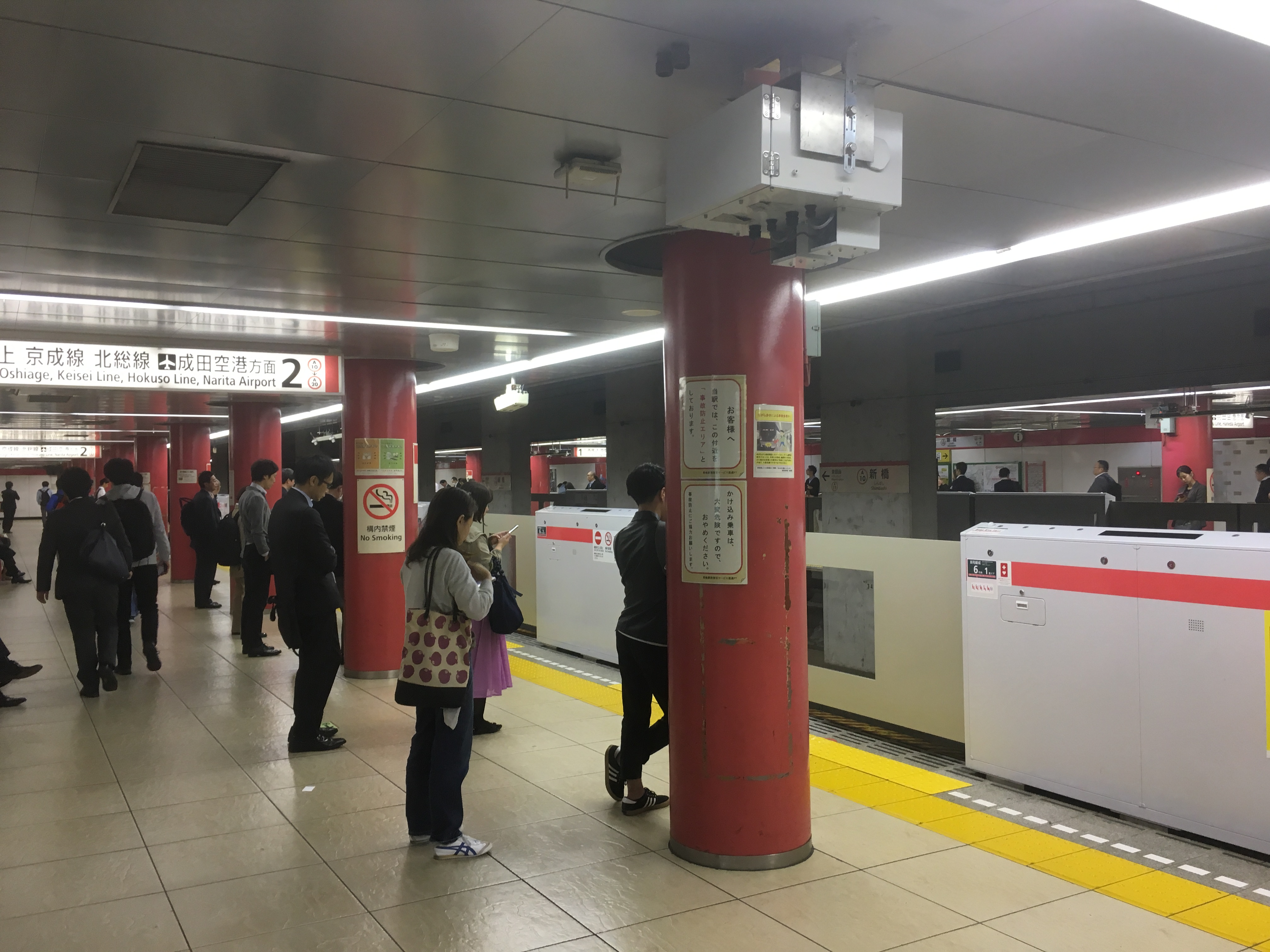 浅草線、新橋駅のホーム (Asakusa Line, Shimbashi Station platform)